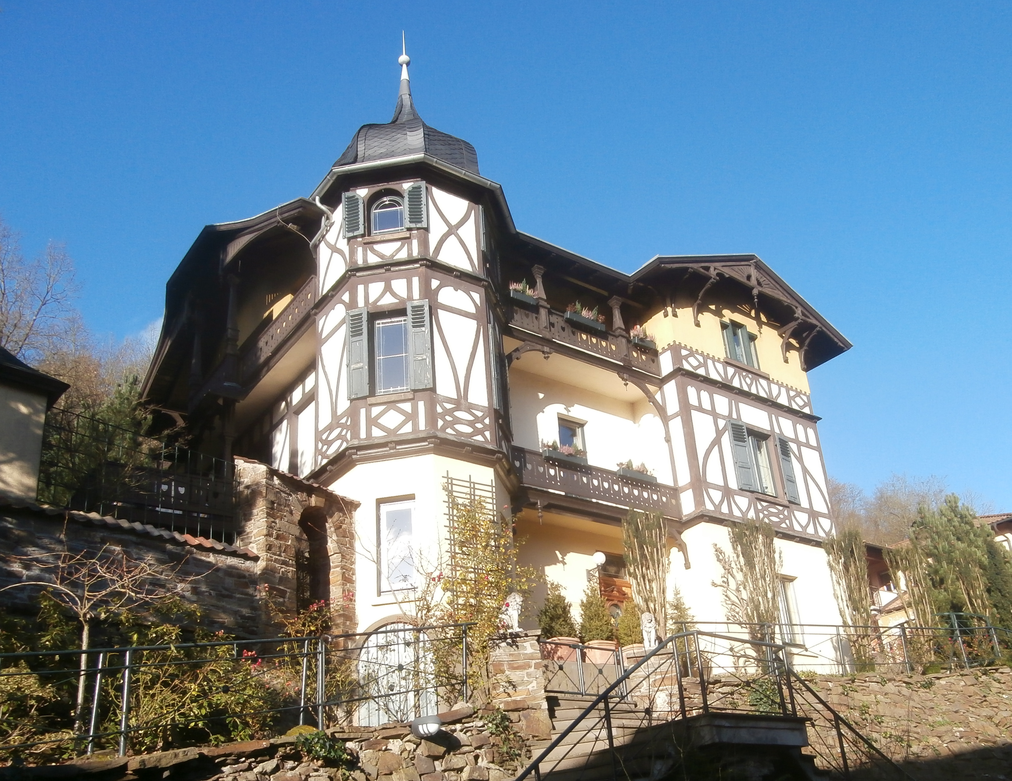 Denkmalgeschützte Villa („Haus Redeligx“), Löwenburgstraße 57, Rhöndorf, Bad Honnef